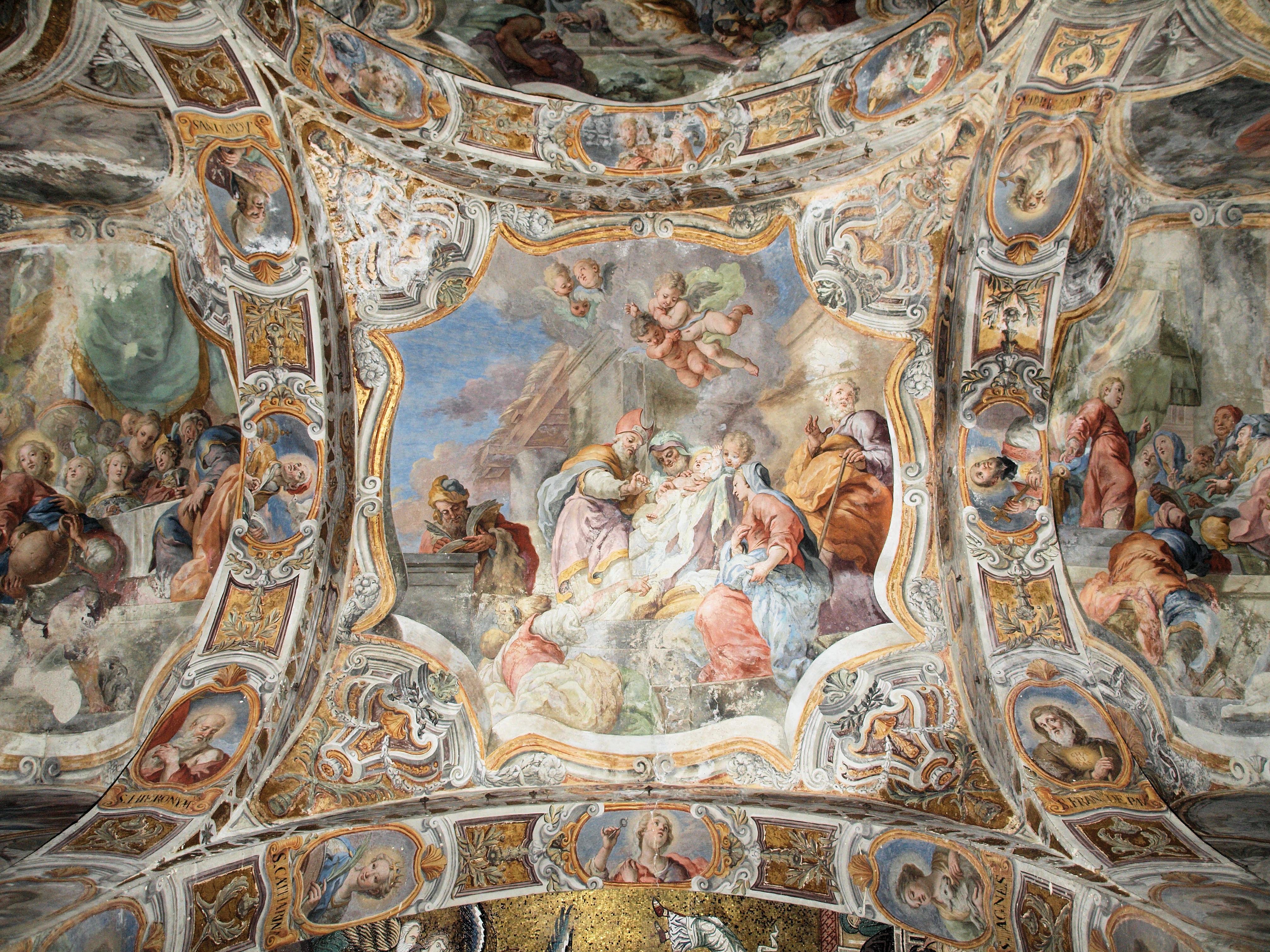 Innenaufnahme aus der Kirche Santa Maria dell'Ammiraglio in Palermo, auch genannt Martorana